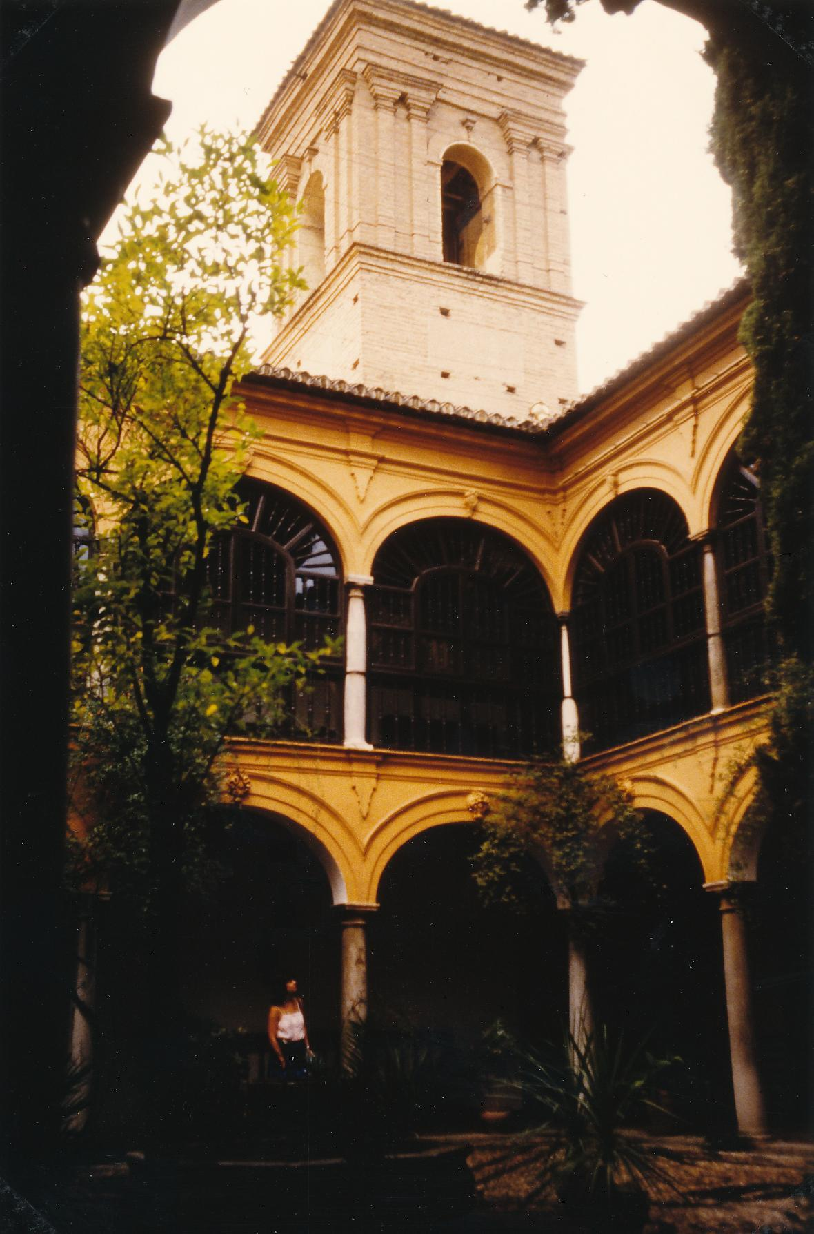 Pardador Nacional San Francisco - in Granada (Alhambra) Datum: 10/1986 Urheber: Michael Pfeiffer Quelle: privates Fotoalbum des Urhebers